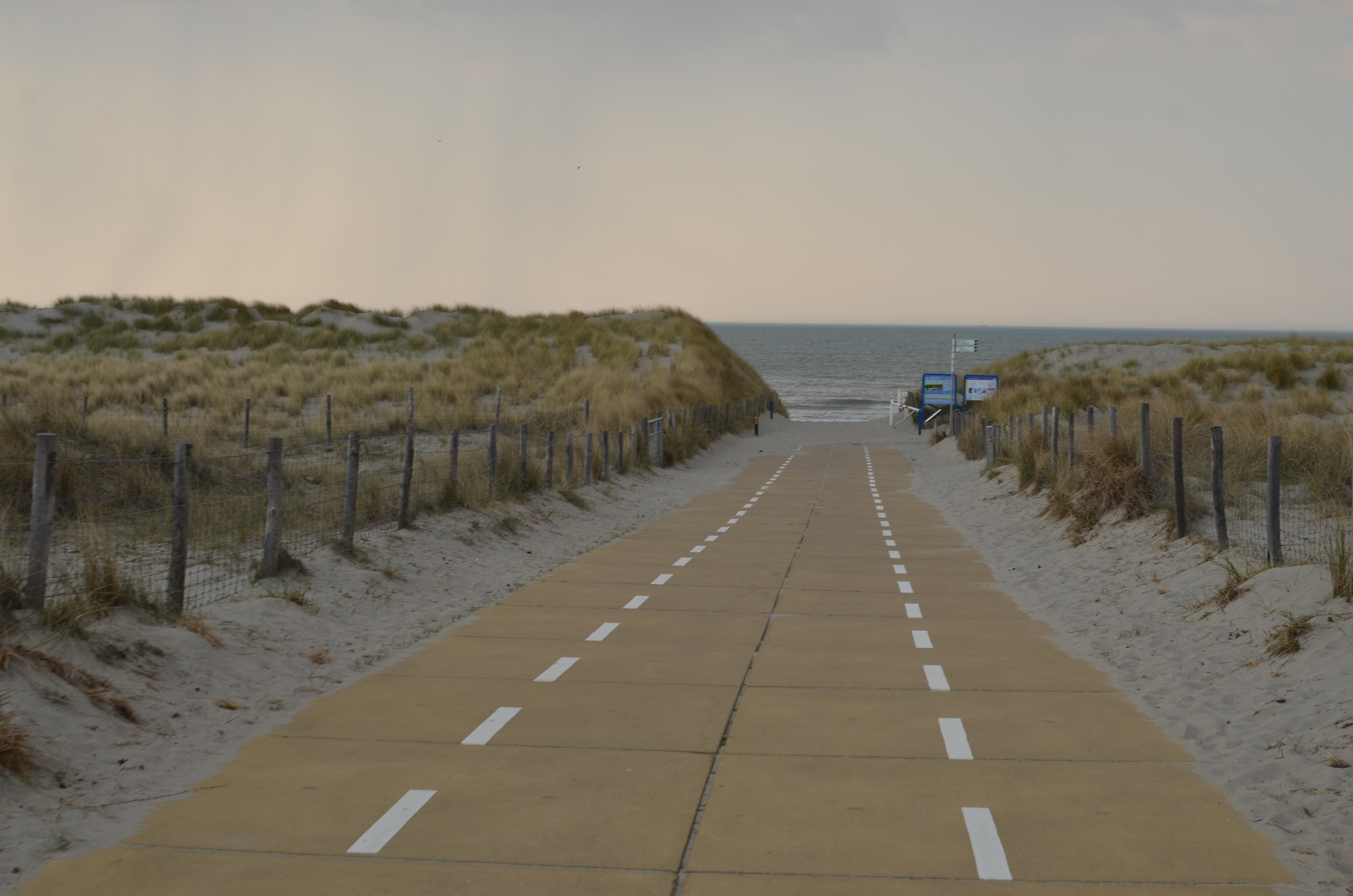 Het strand van 's-Gravenzande, strandopgang Arendsduin.